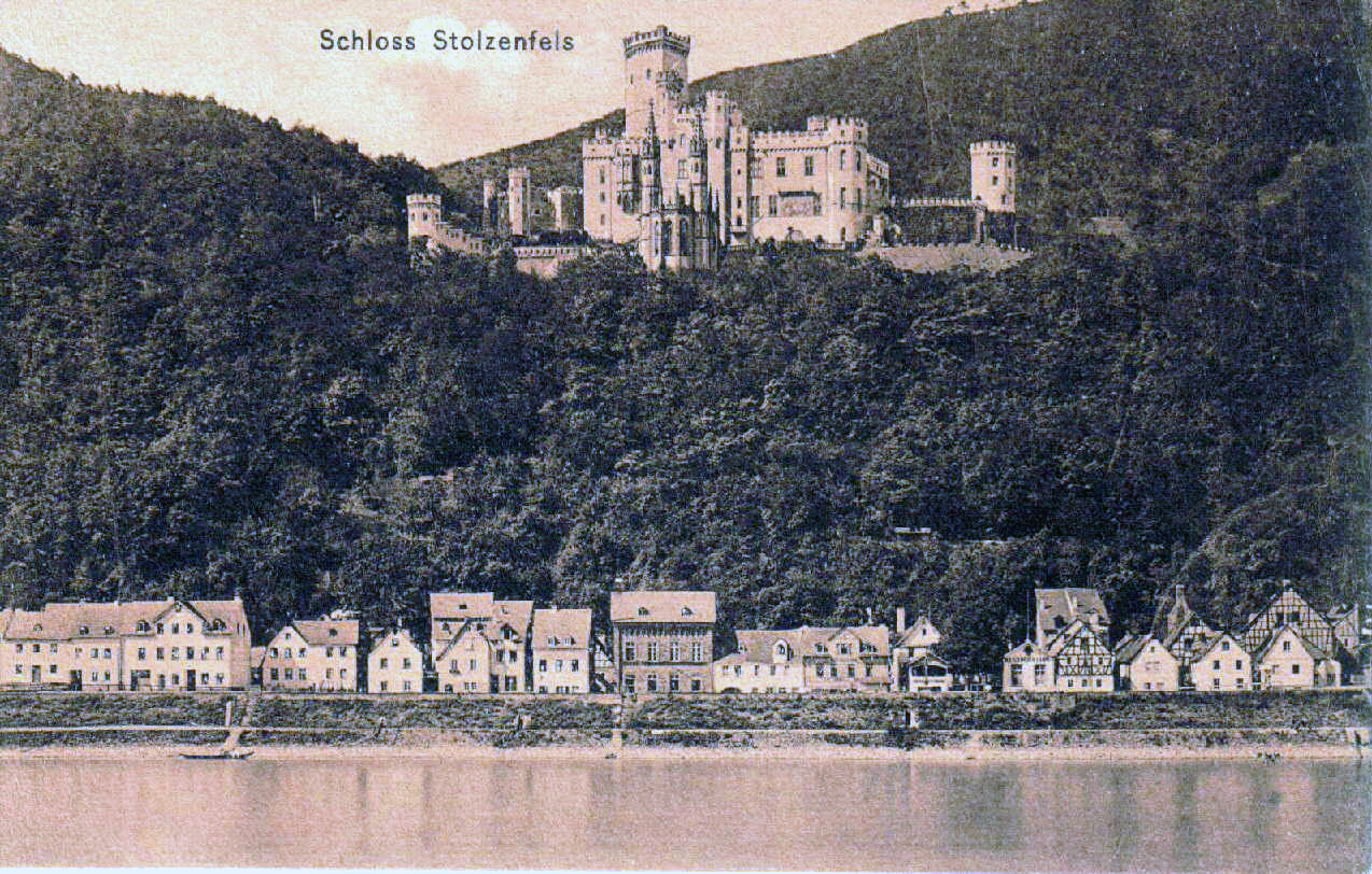 Schloss Stolzenfels in Koblenz